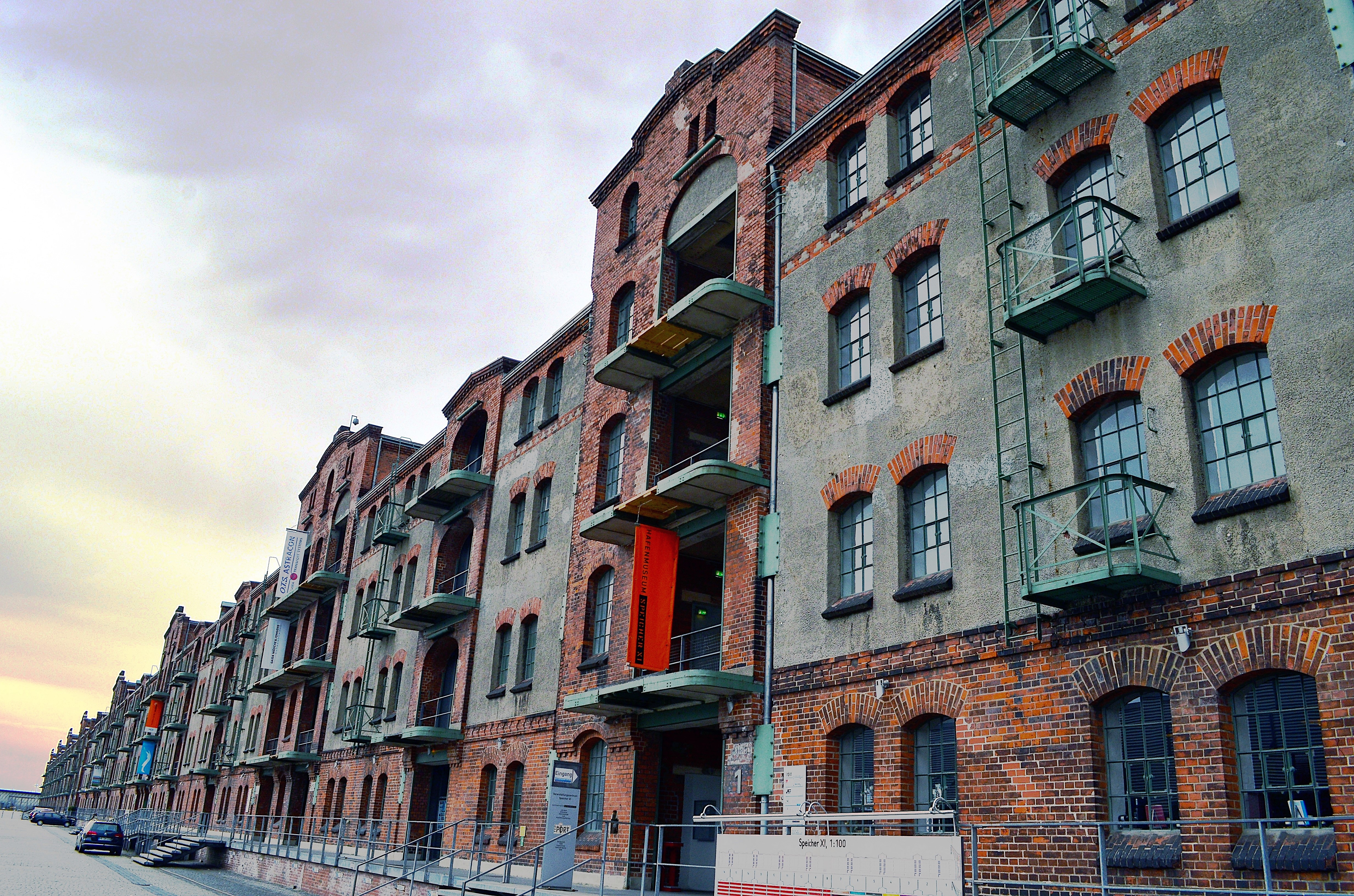 Nordfassade des ehemaligen Speichers XI im Überseehafengebiet von Bremen. Heute wird das Gebäude nach Sanierung und Revitalisierung u. a. vom Hafenmuseum Bremen und der Hochschule für Künste Bremen genutzt. Das abgebildete Objekt ist ein geschütztes Kulturdenkmal in der Freien Hansestadt Bremen, mit der Nr. 0324 beim Landesamt für Denkmalpflege registriert.